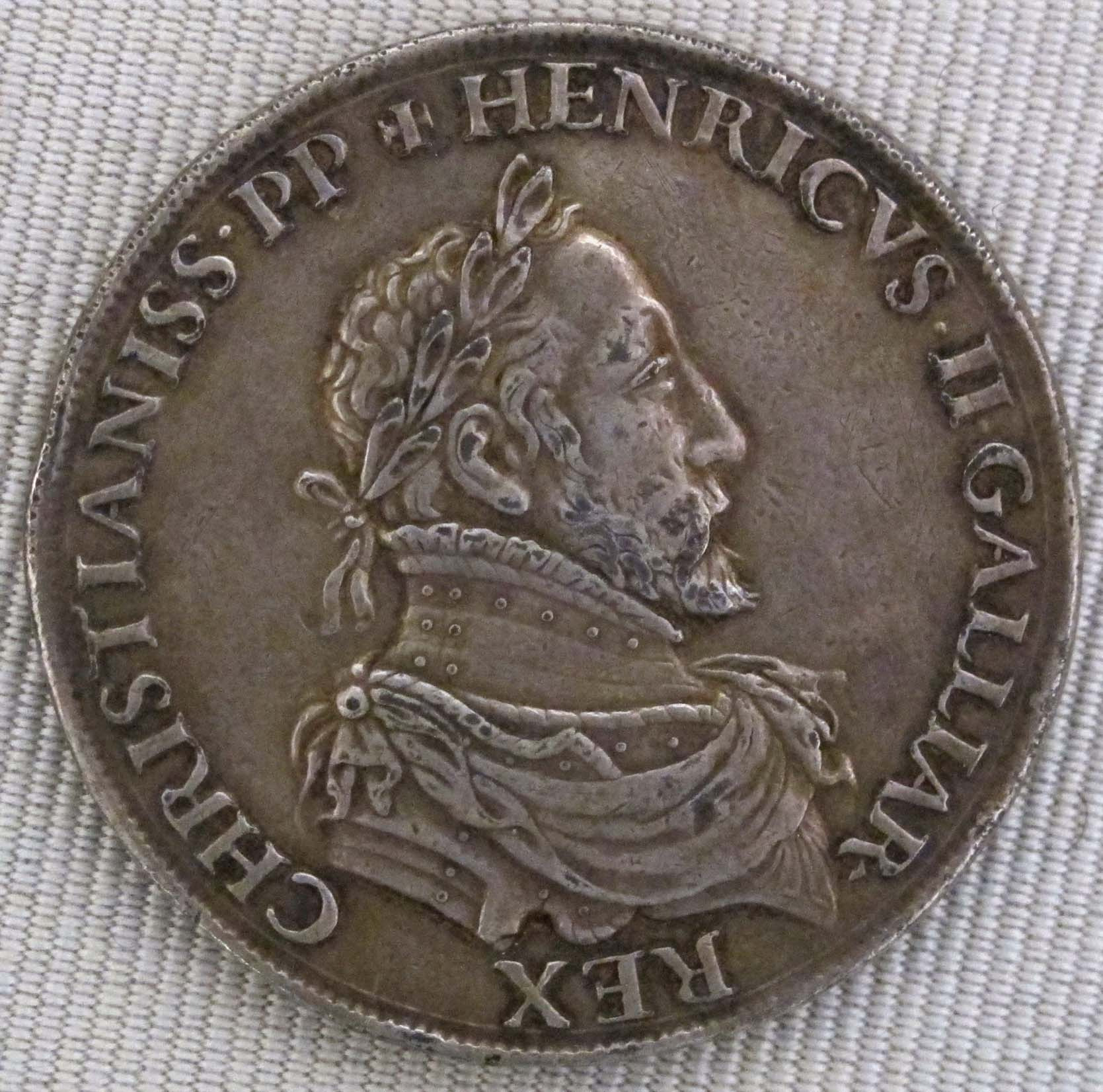 Valois, enrico II, pezzo commemorativo in argento dorato, 1558